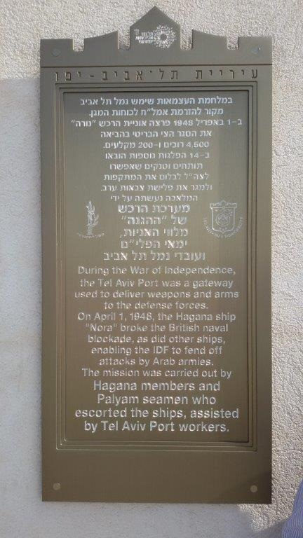 לוח זכרון בנמל תל אביב המתאר את פריקת אוניות הרכש בתקופה שלפני קום המדינה ומהלך מלחמת העצמאות.